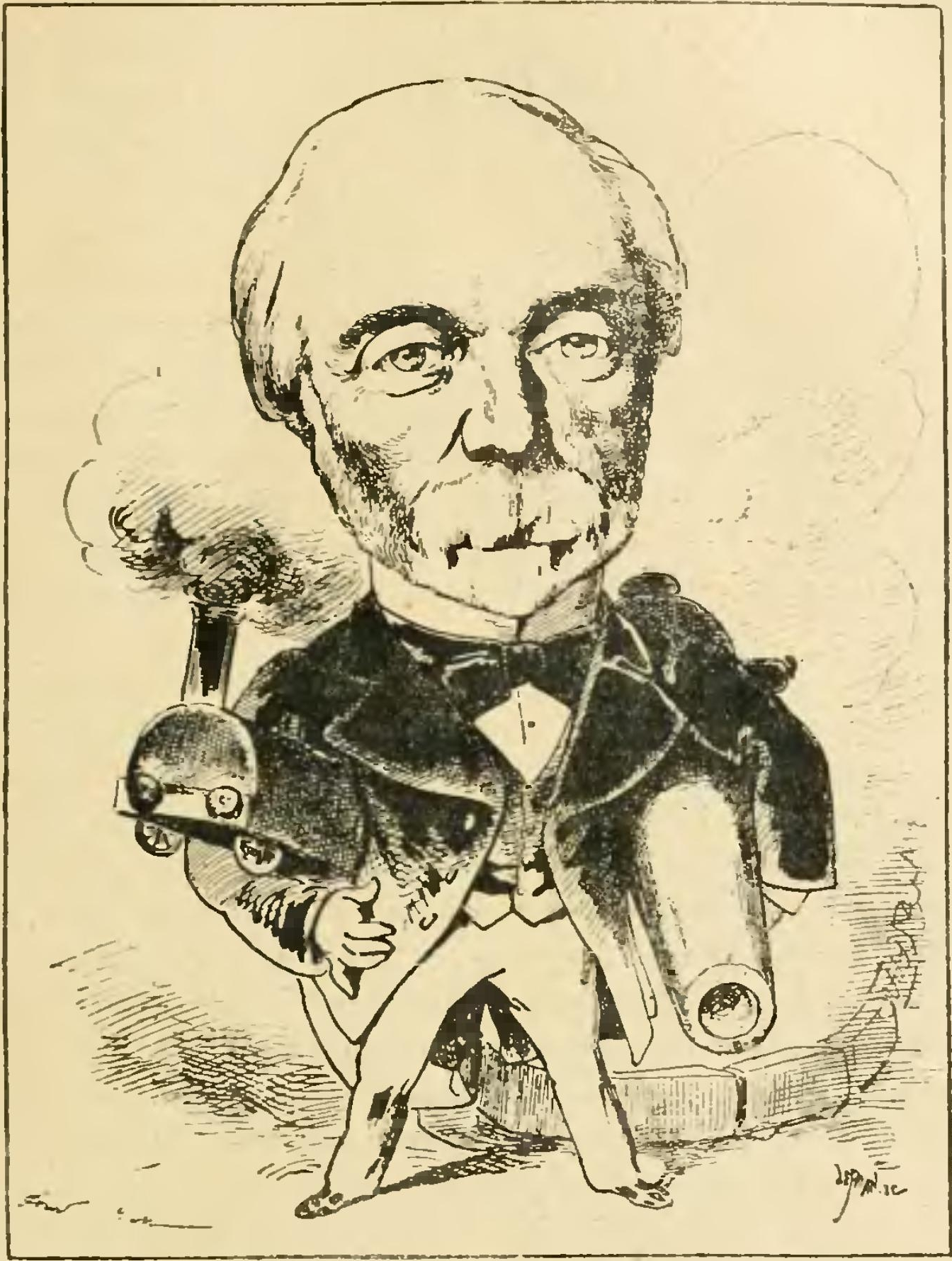 Caricature de Charles de Freycinet.